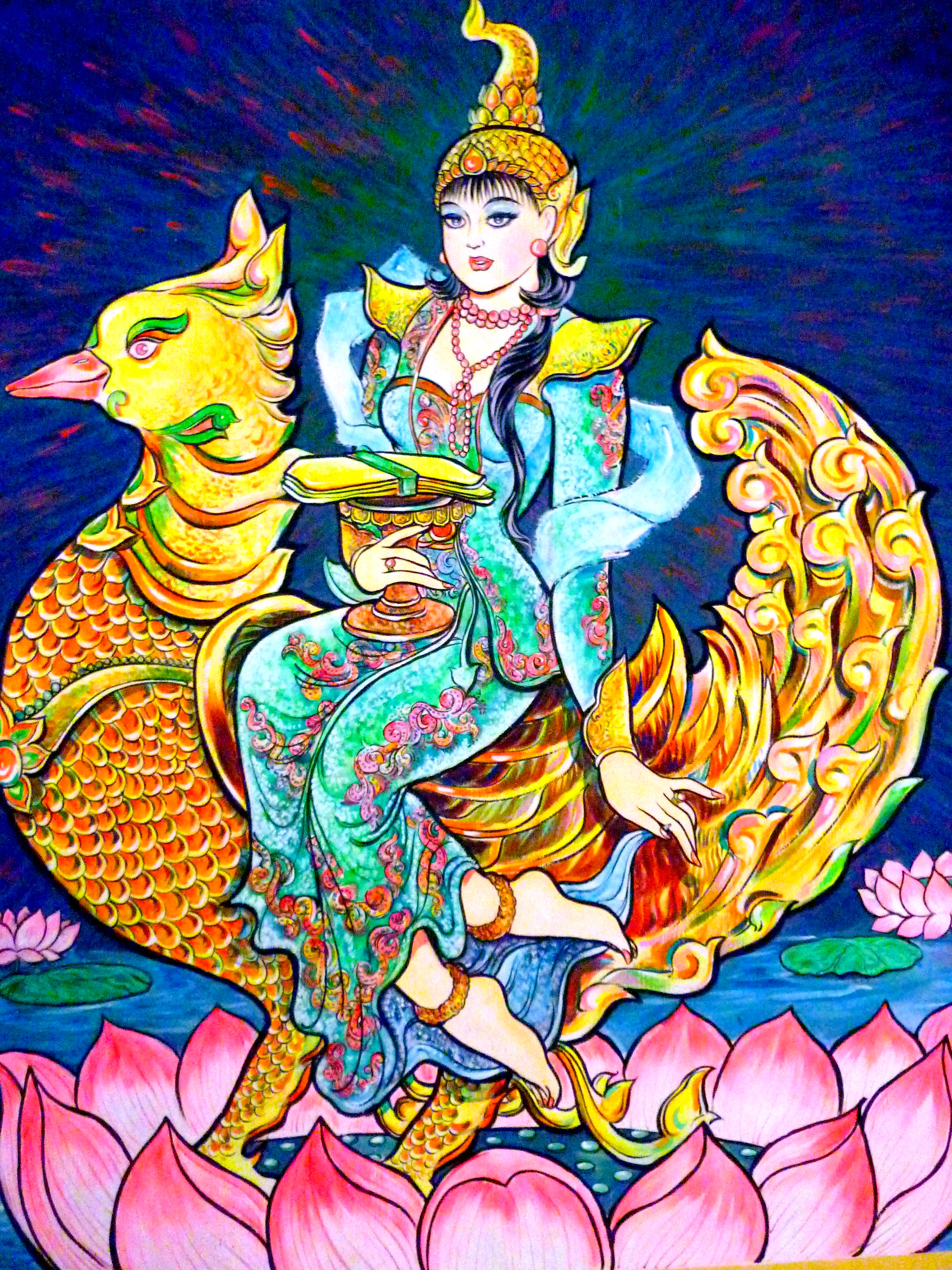 067 Sarasati Devi, at Wat Olak Madu, Kedah